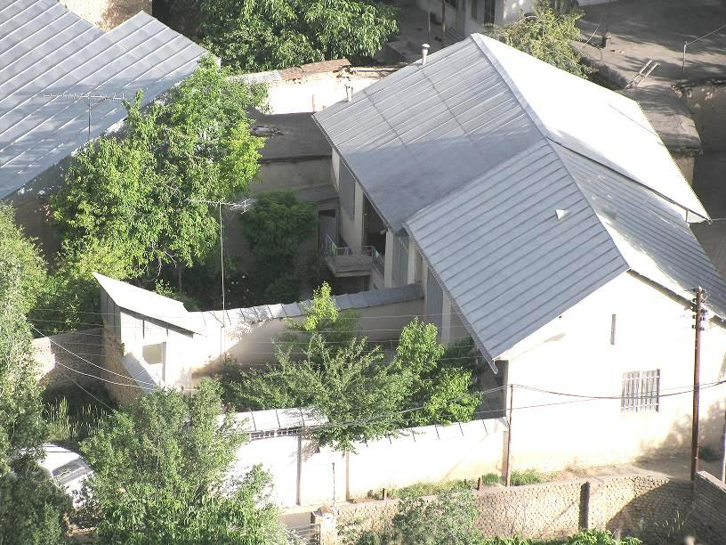 معماري ده هاي 60 و 70 روستاي باريكان